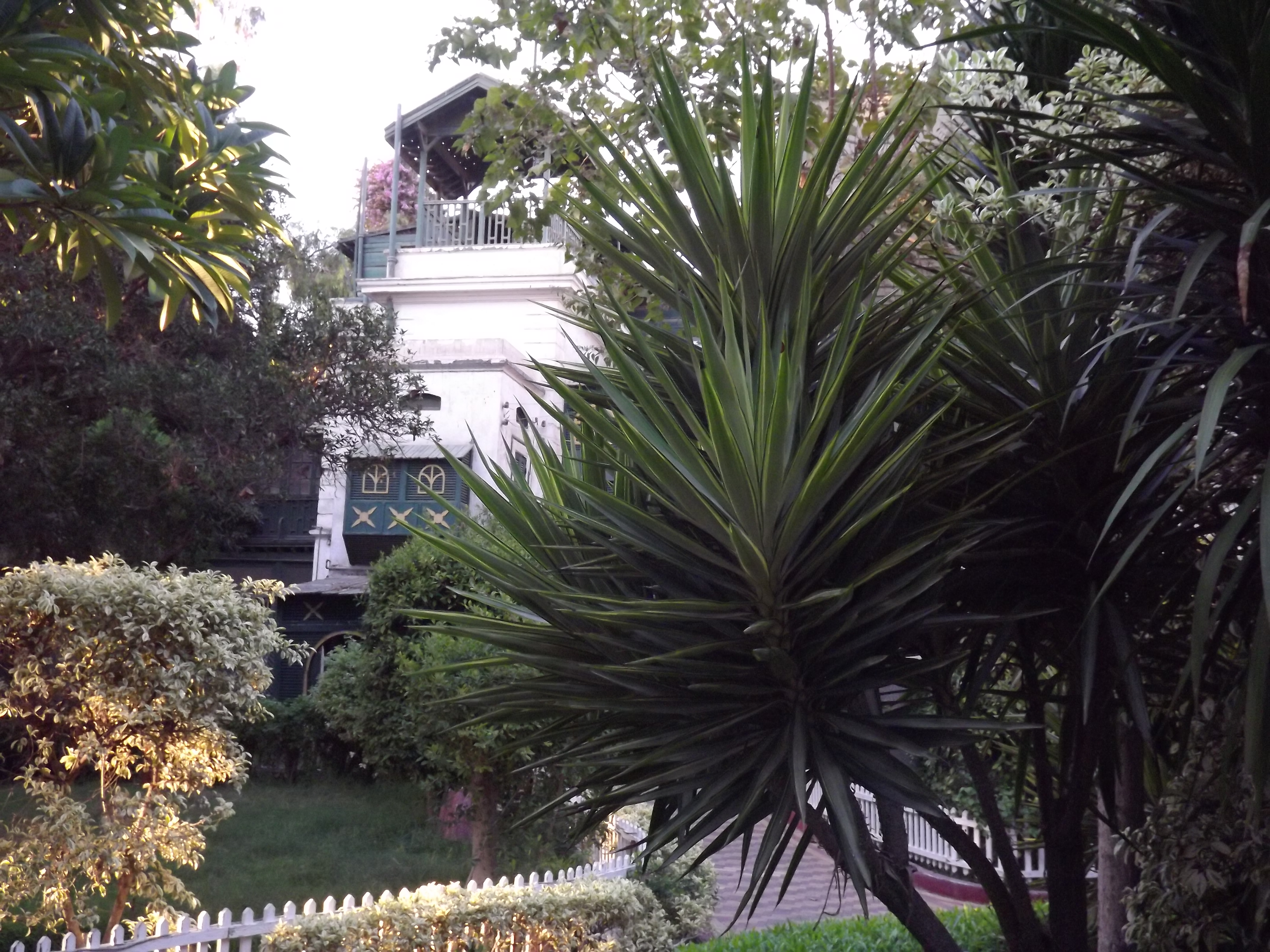 البيت الحكومي (الادارة المركزية لحدائق الحيوان) في حديقة حيوان الجيزة